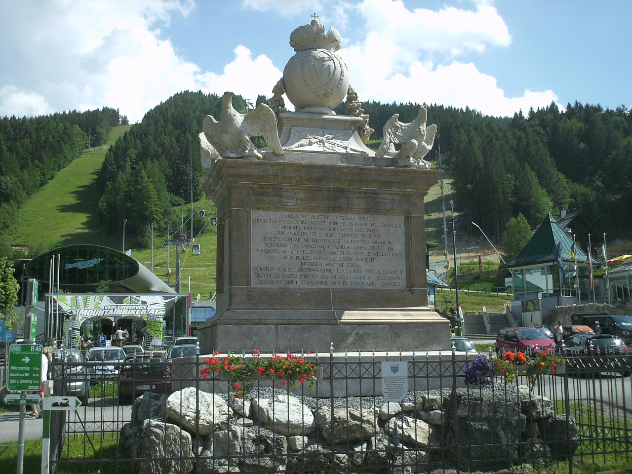 Ereignisdenkmal, sog. Carolus-Denkmal (Kaiser Karl VI.) am Semmeringpass/Österreich.